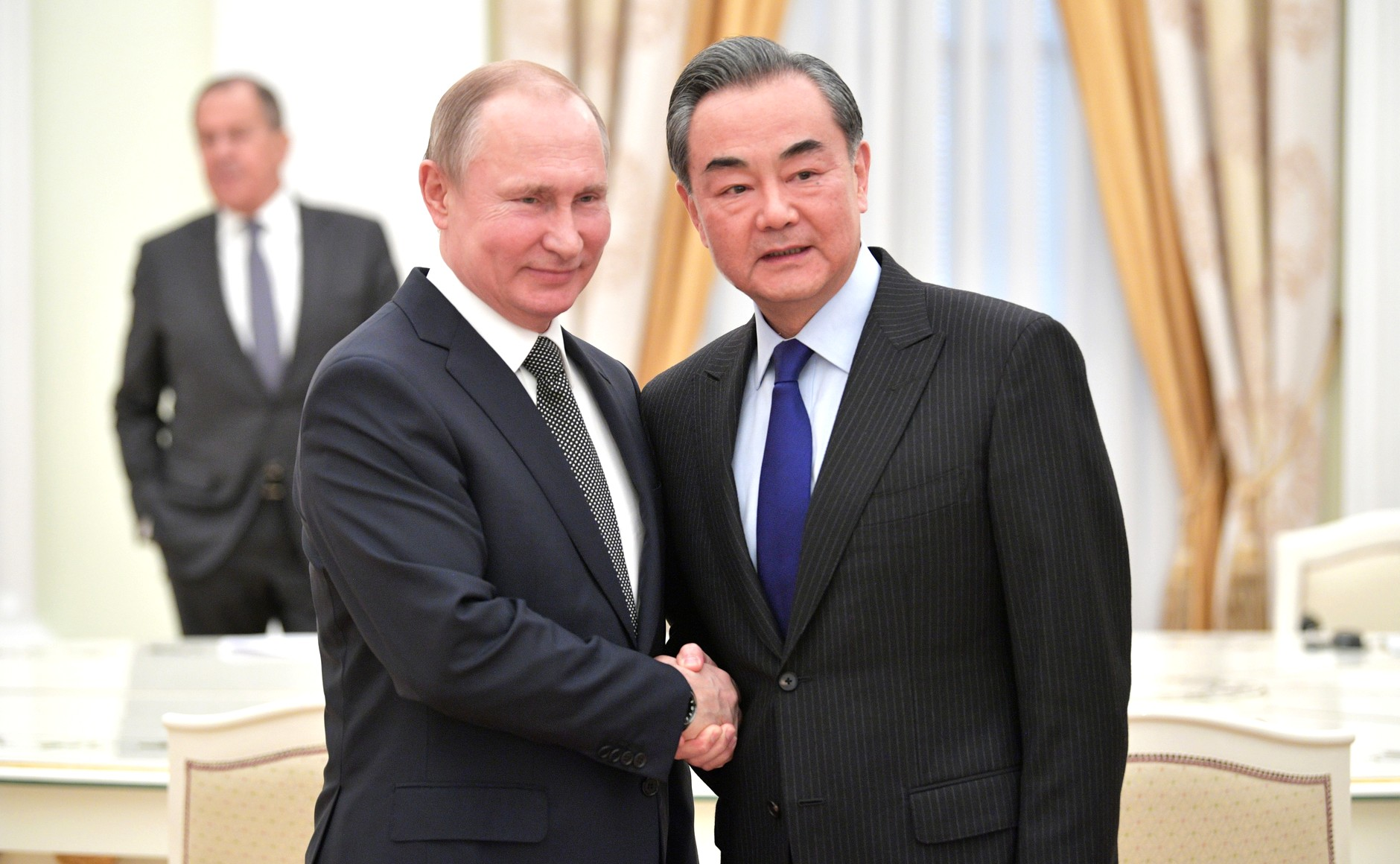 Встреча Президента России Владимира Путина со спецпредставителем Председателя Китайской Народной Республики, членом Госсовета КНР, Министром иностранных дел Китая Ван И